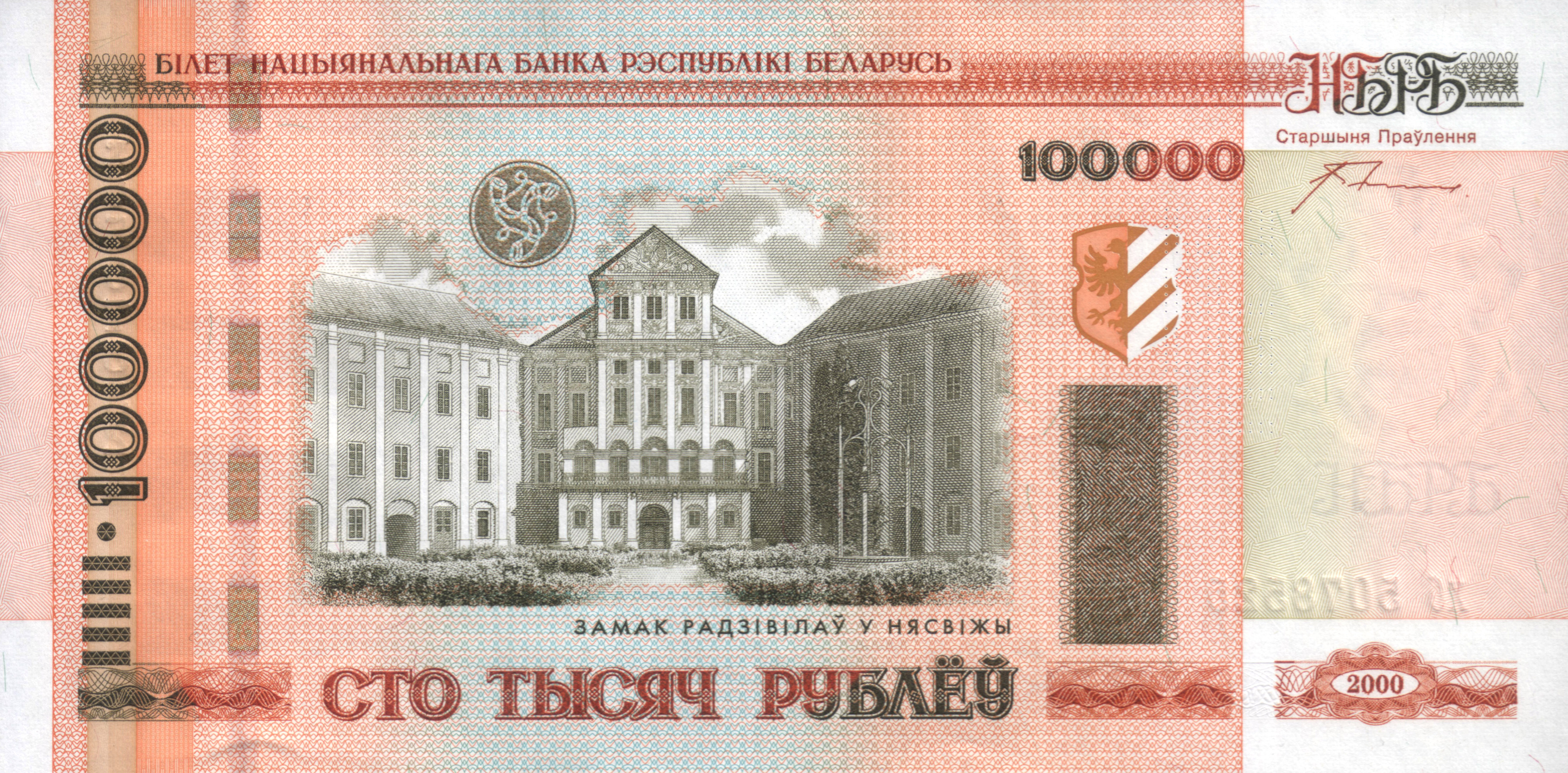 2000 Belarus 100000 rubles bill. Obverse.